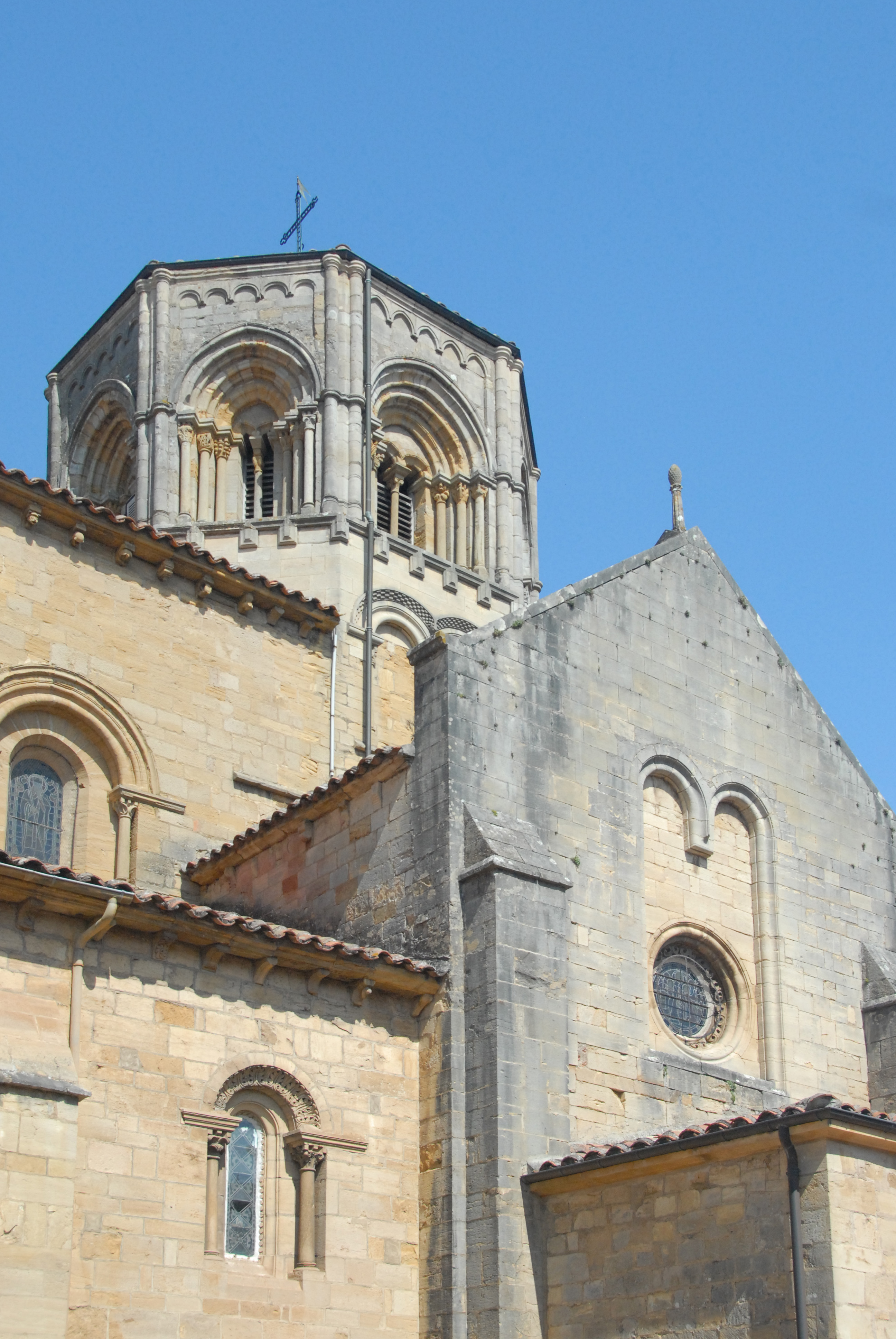 St-Hilaire de Semur-en-Brionnais, Querhau u. Turm von S